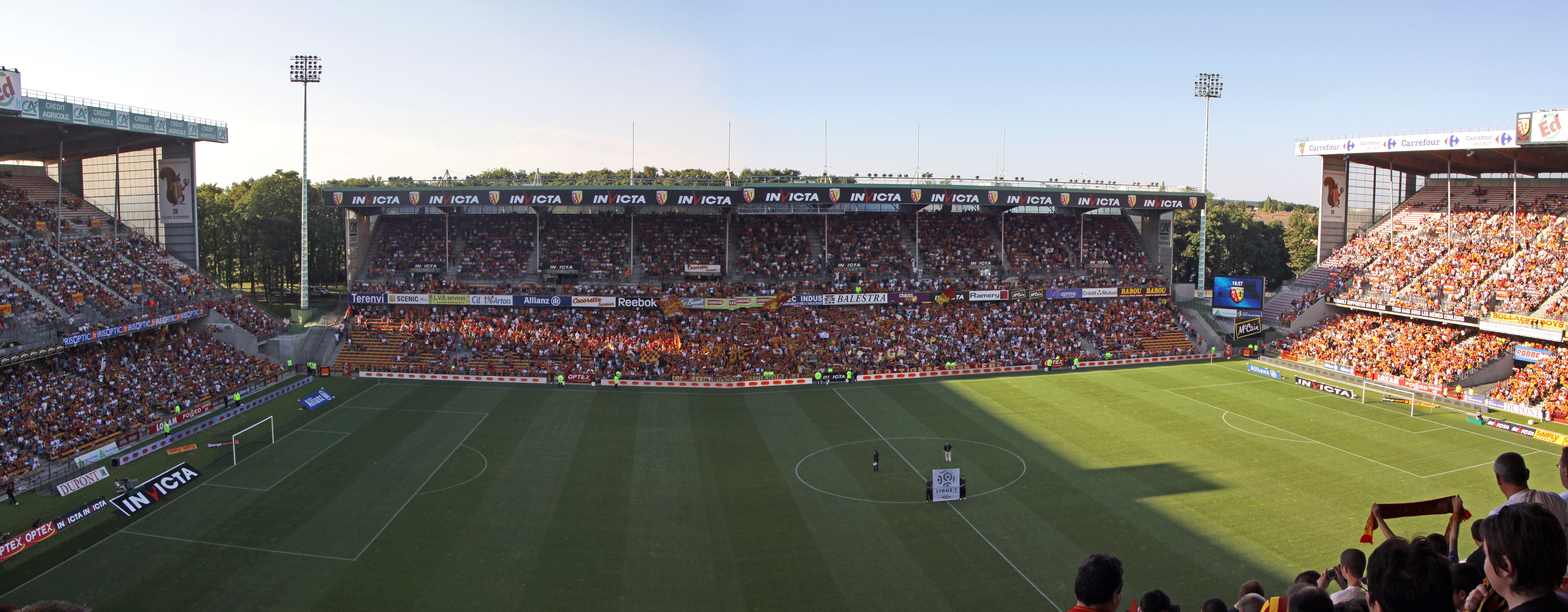 La Tribune Marek du Stade Bollaert.